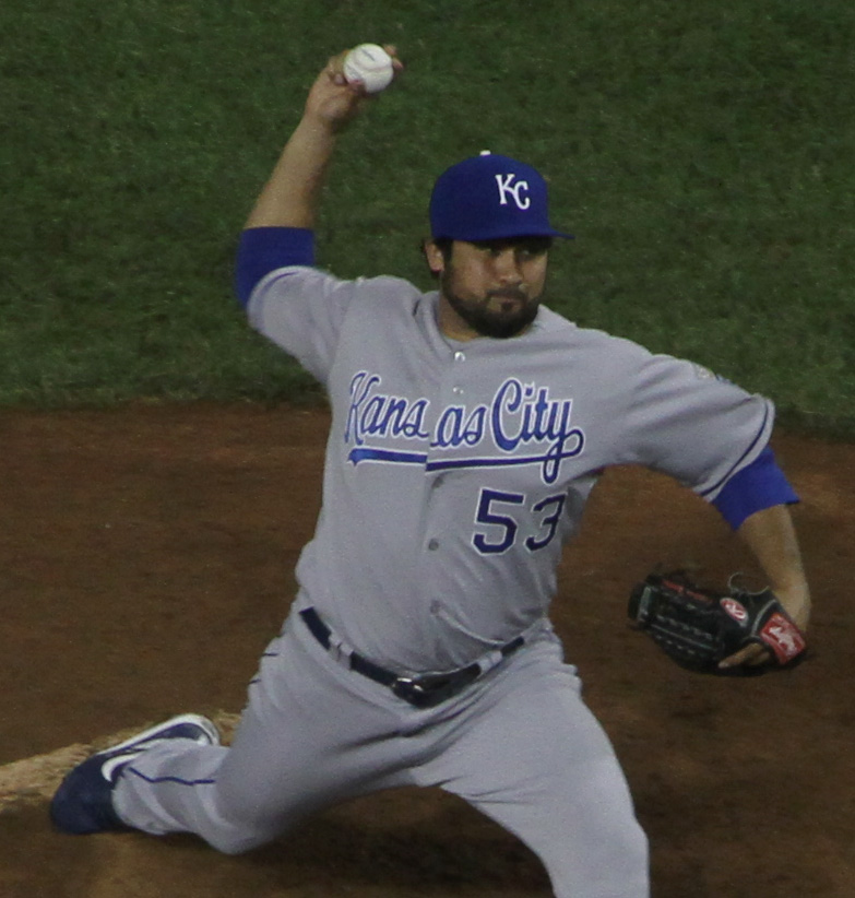 Kanekoa Texeira